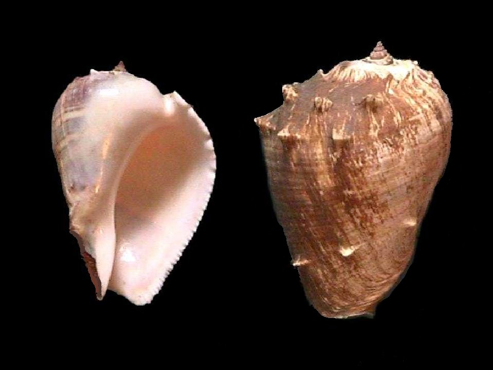 Melongena melongena cerca de Puerto Cumarebo, Falcon Venezuela